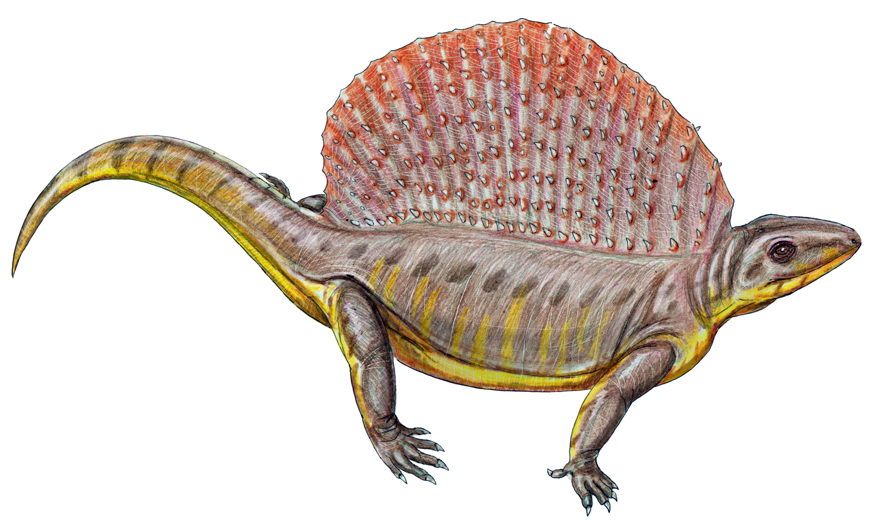 Bohemiclavulus mirabilis restoration.